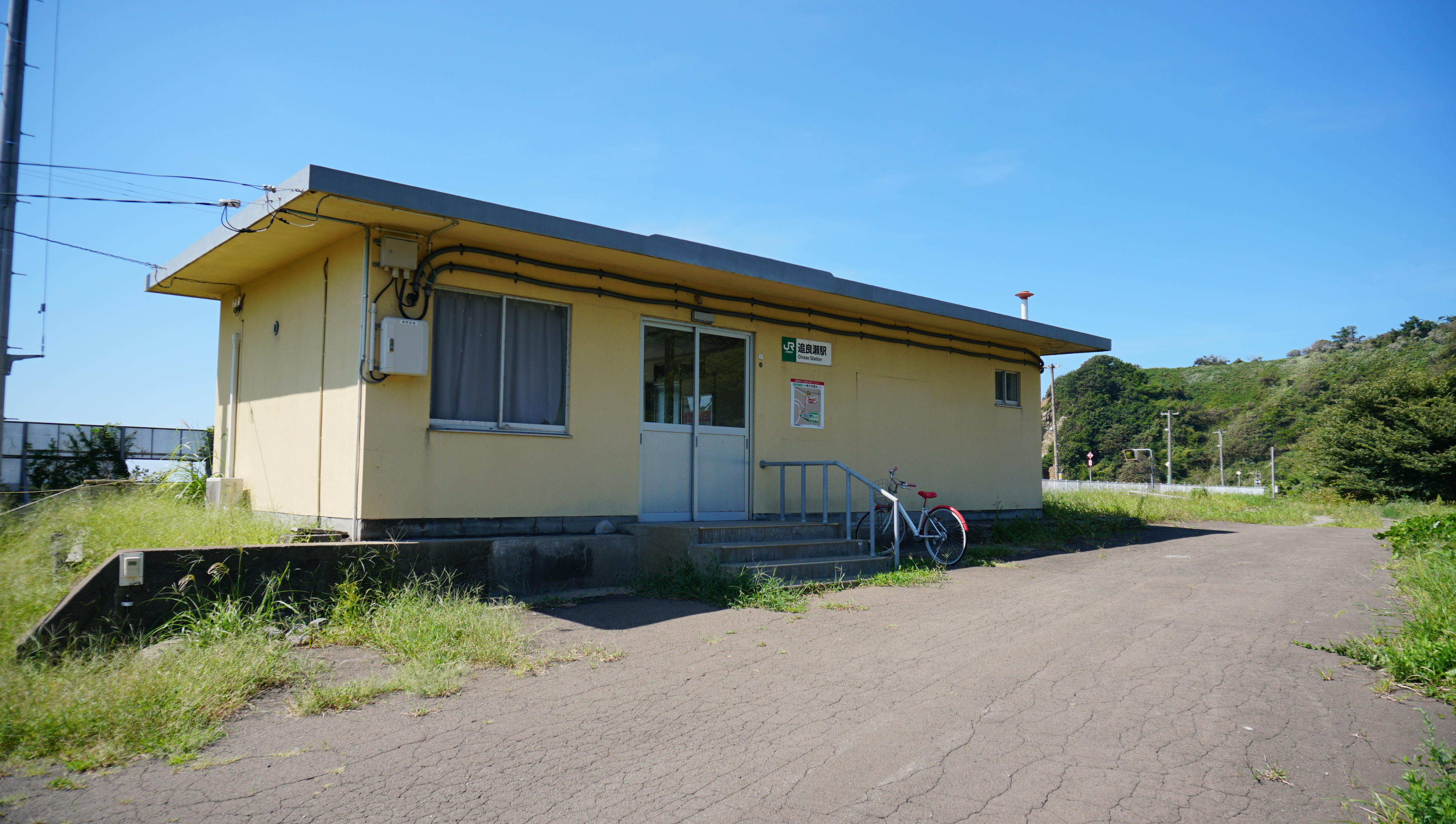 五能線 追良瀬駅（青森県西津軽郡深浦町）